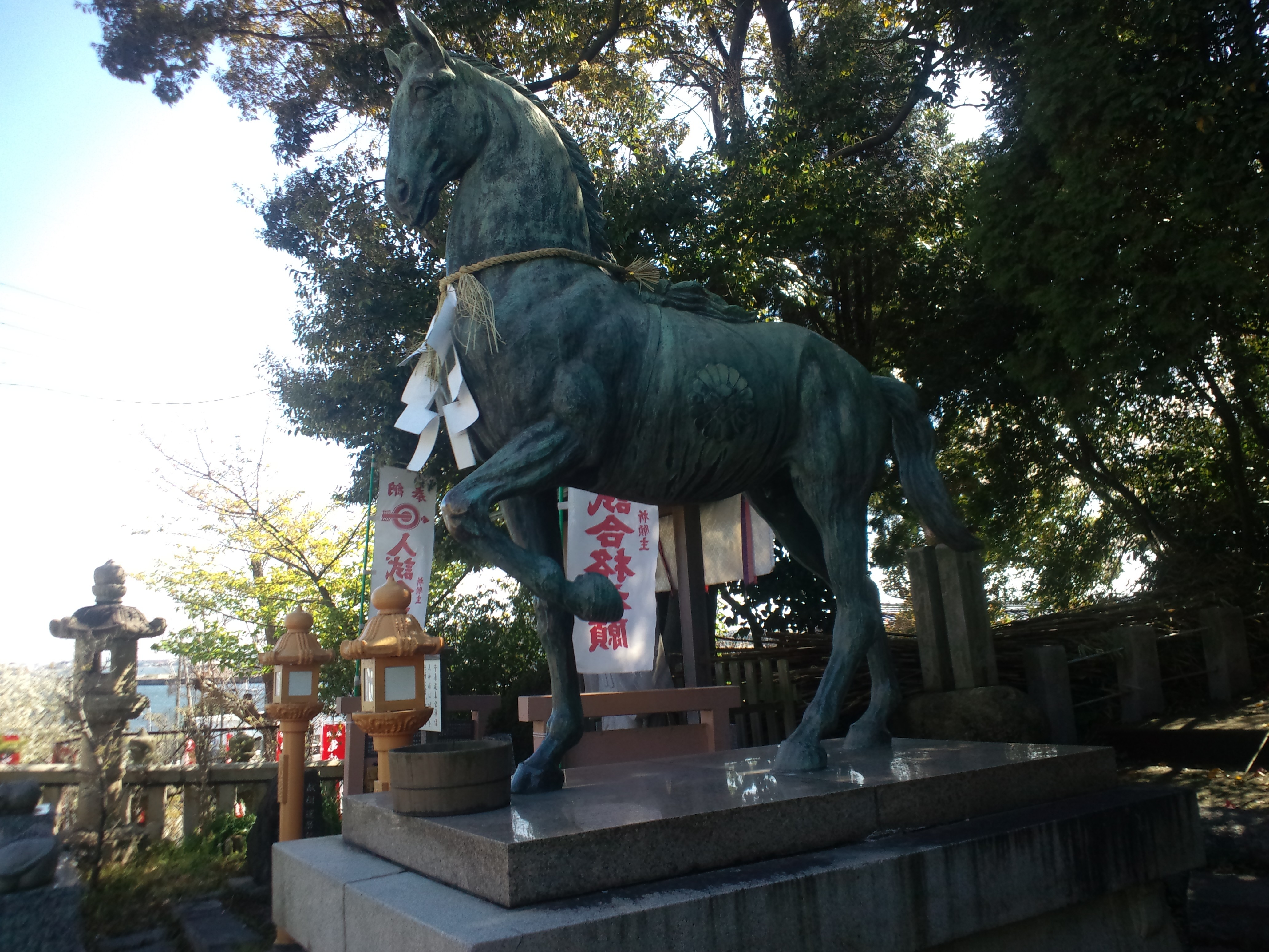 神前神社 神馬